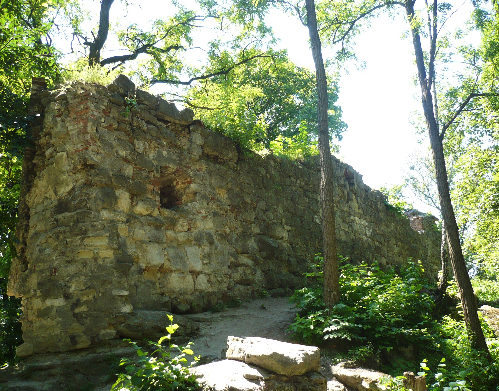 Lwów. Wysoki Zamek